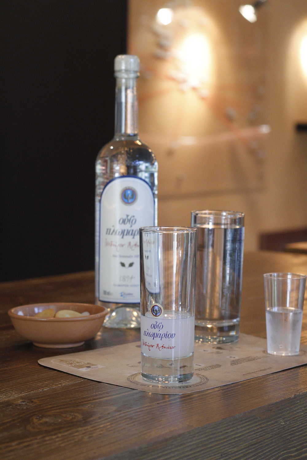 Η γευσιγνωσία του Ούζου Πλωμαρίου